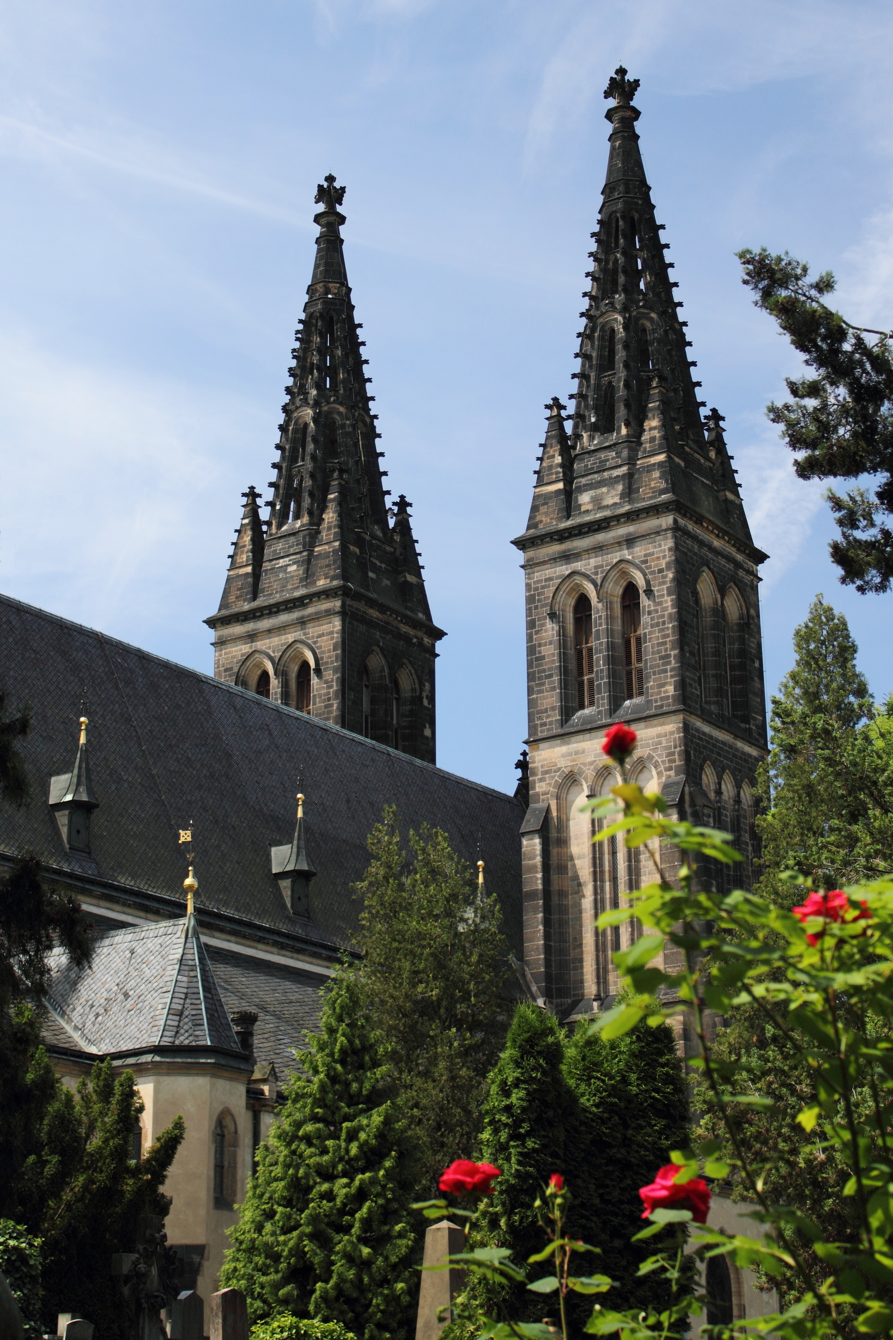 Bazilika sv. Petra a Pavla, Vyšehrad, pohled ze hřbitova